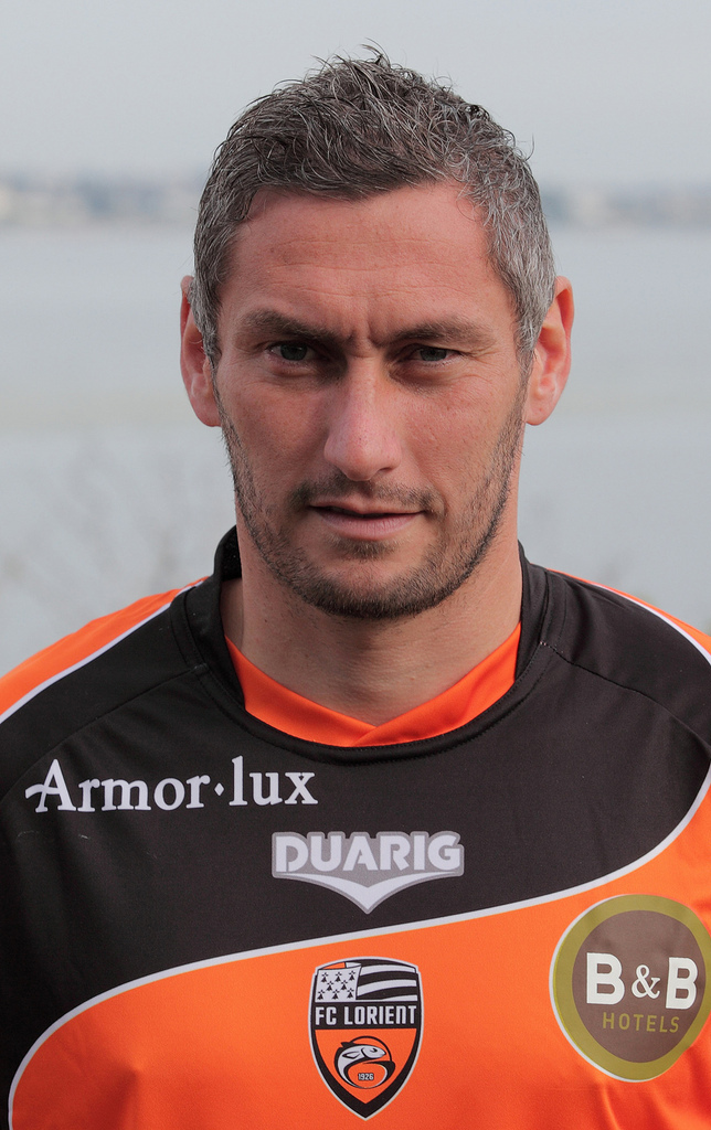 Olivier Monterrubio, joueur de l'équipe de football du FC Lorient en 2010.